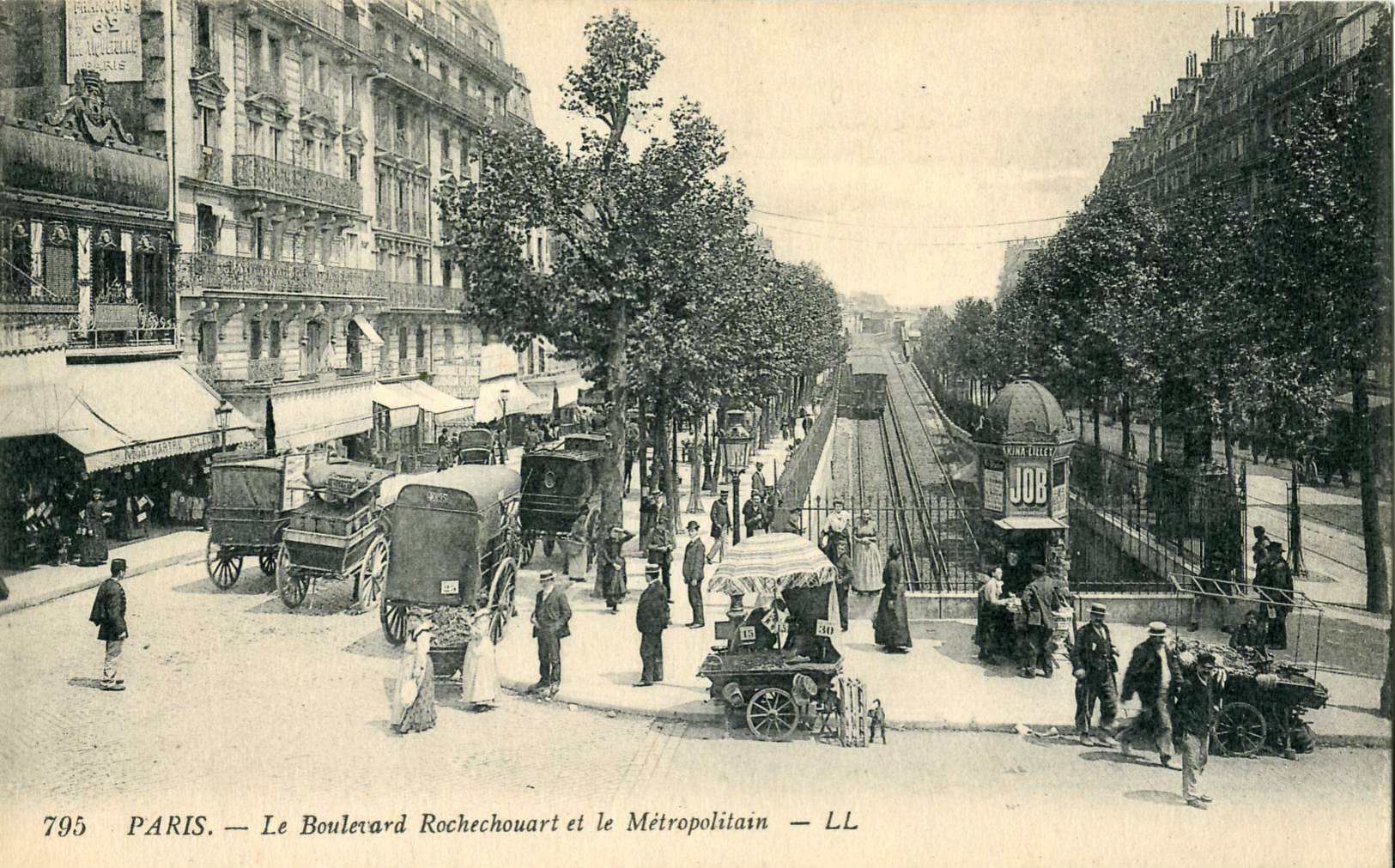 Carte postale ancienne éditée par LL, n°795 :PARIS - Le Boulevard Rechechouard et le Métropolitain